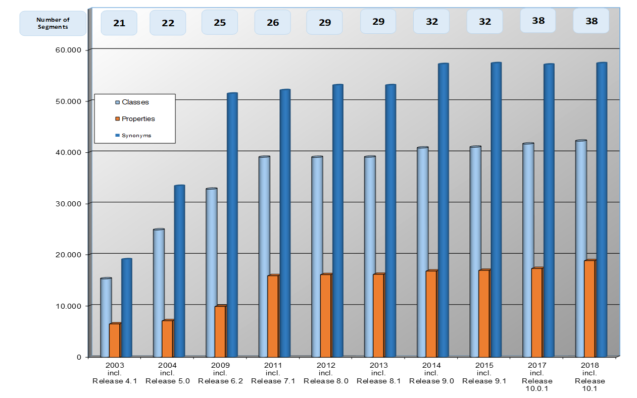 Das Organigramm zeigt die Struktur des Vereins